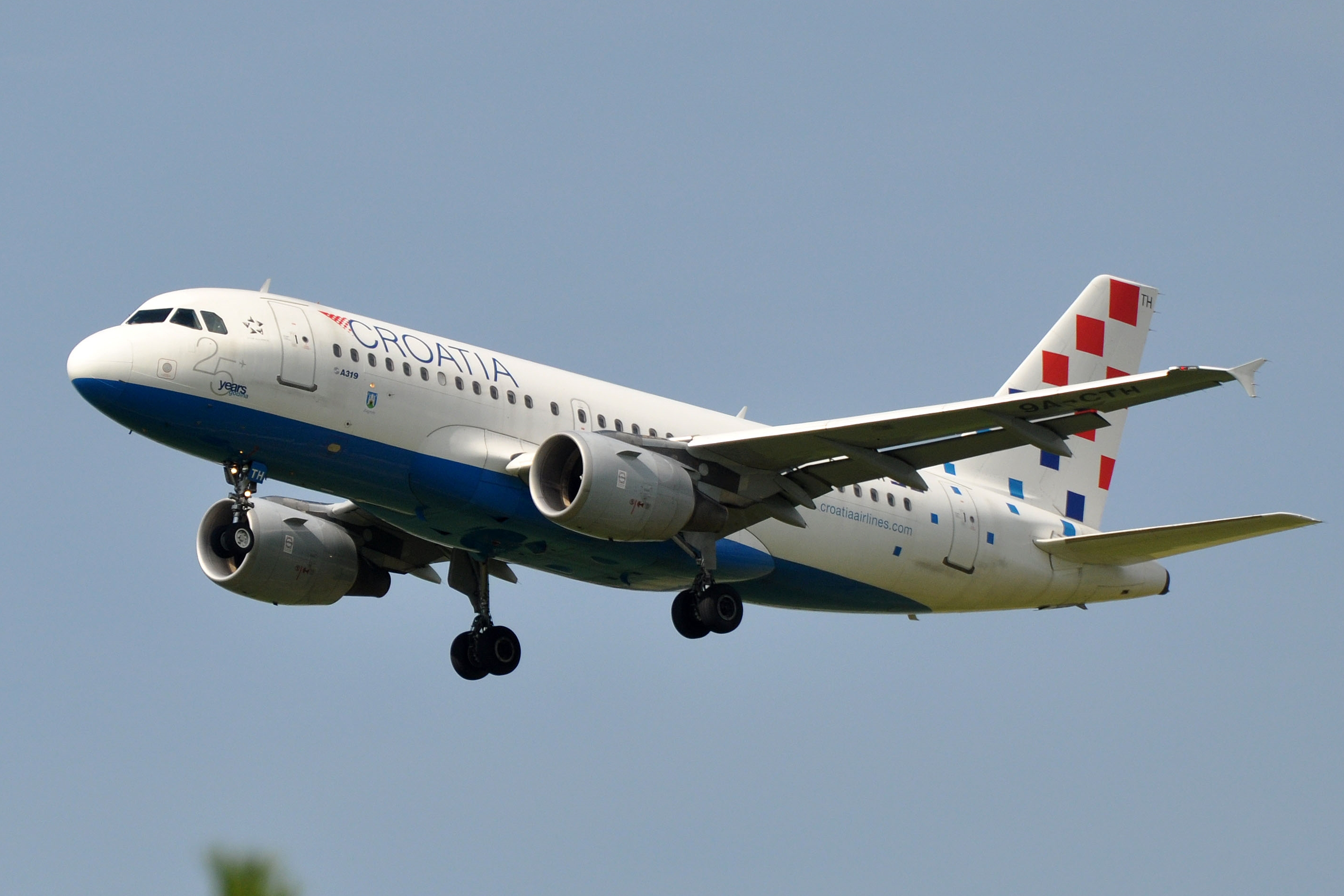 MSN 833 A319-112 CROATIA AIRLINES CDG AIRPORT